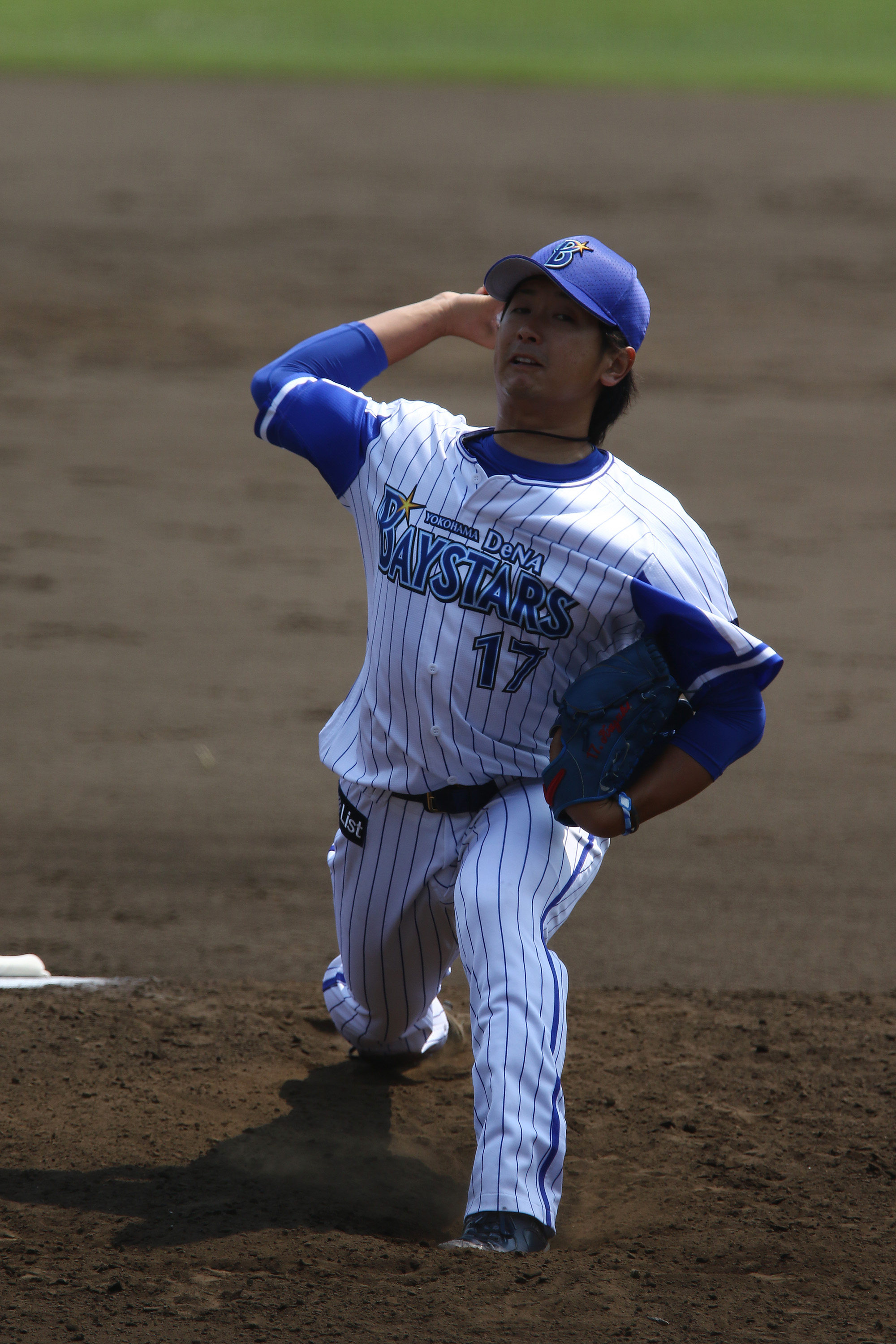 横浜DeNAベイスターズの三嶋一輝